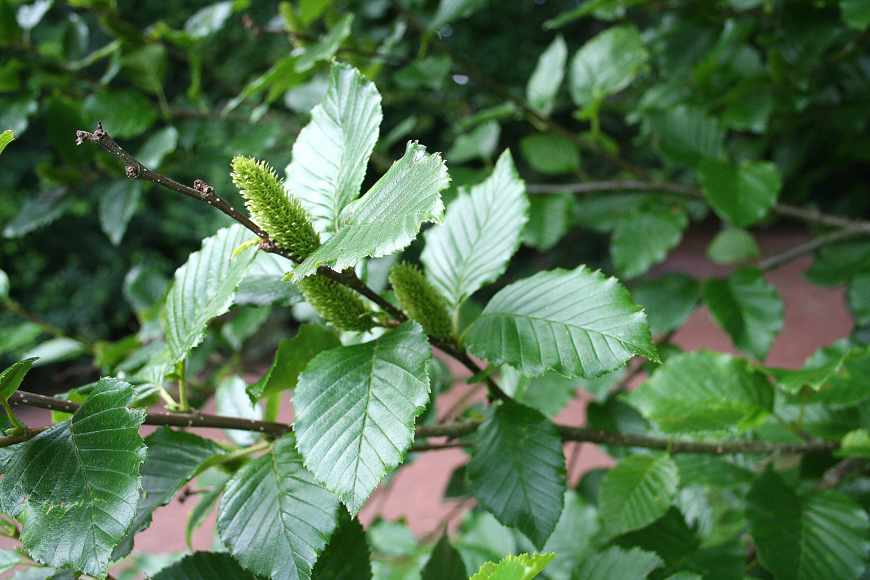 Feuilles et chatons du Bouleau transcaucasien (Betula medwediewii)